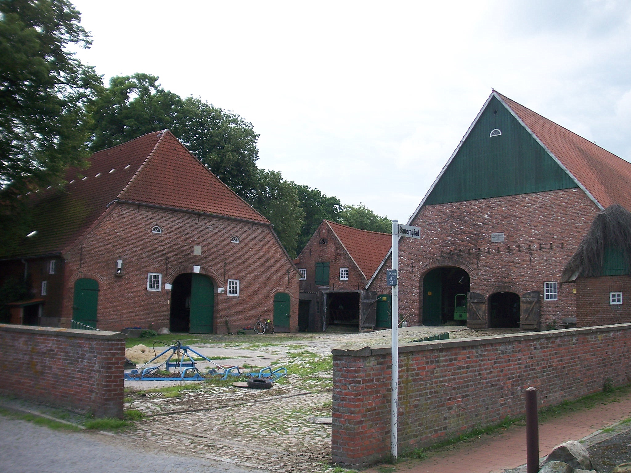 Hof Sibberns in Bremerhaven, Morgensternstraße 12.Das abgebildete Objekt ist ein geschütztes Kulturdenkmal in der Freien Hansestadt Bremen, mit der Nr. 1649 beim Landesamt für Denkmalpflege registriert.